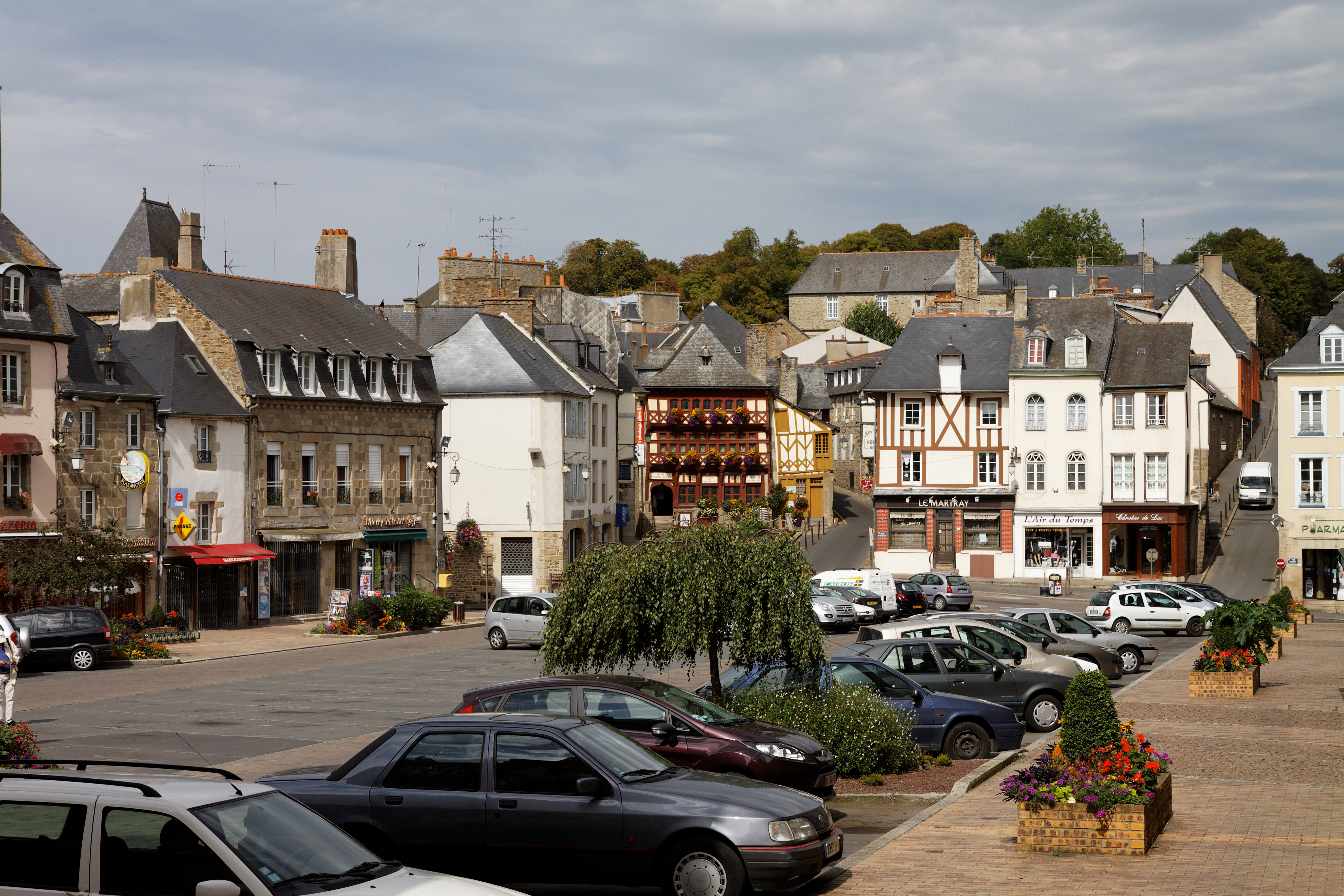 La place du marché de Lamballe.